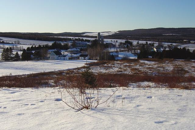 Village de St-Jacques-le-Majeur-de-Wolfestown,Qc,Canada